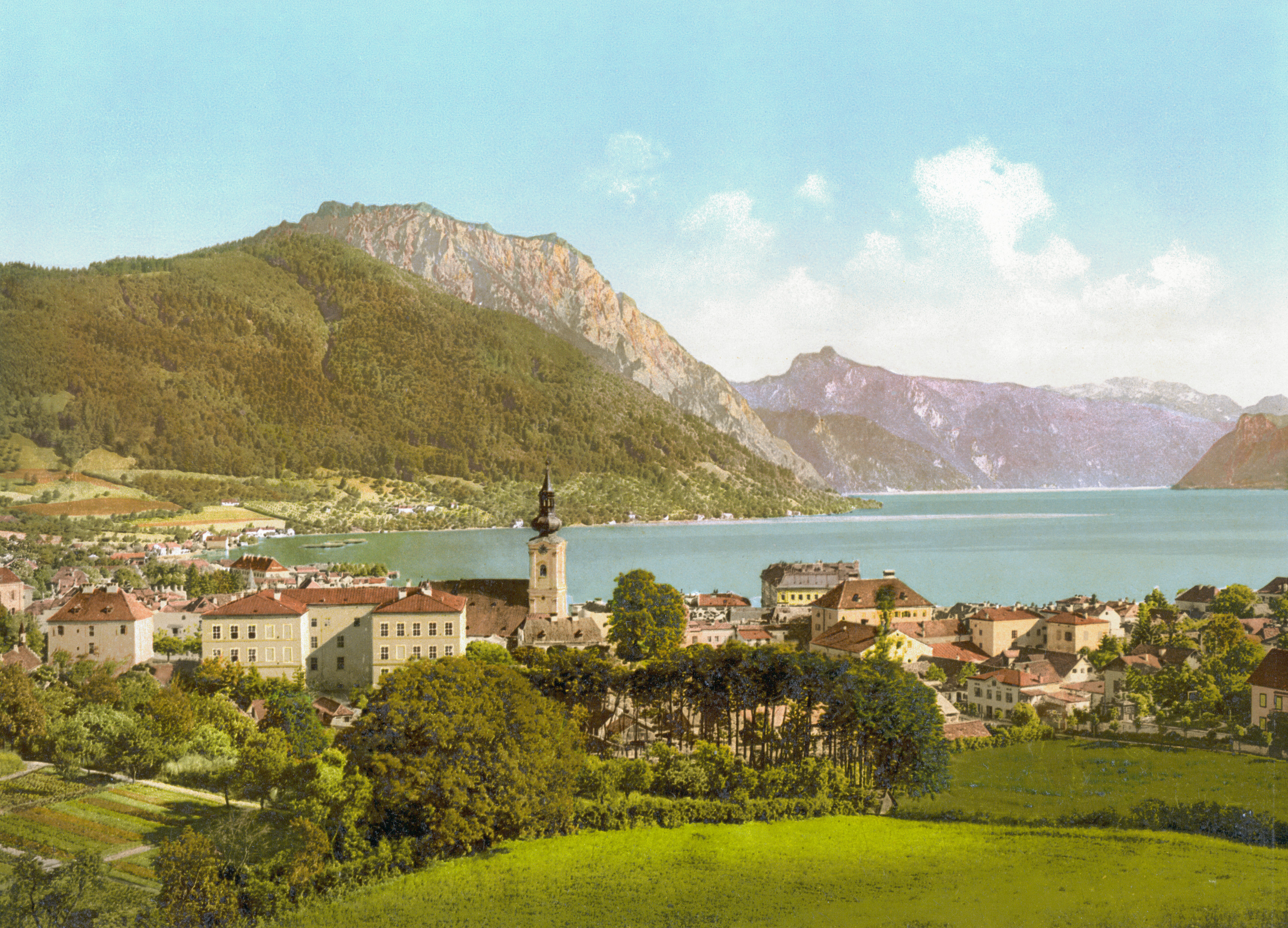 Gmunden am Traunsee um 1900